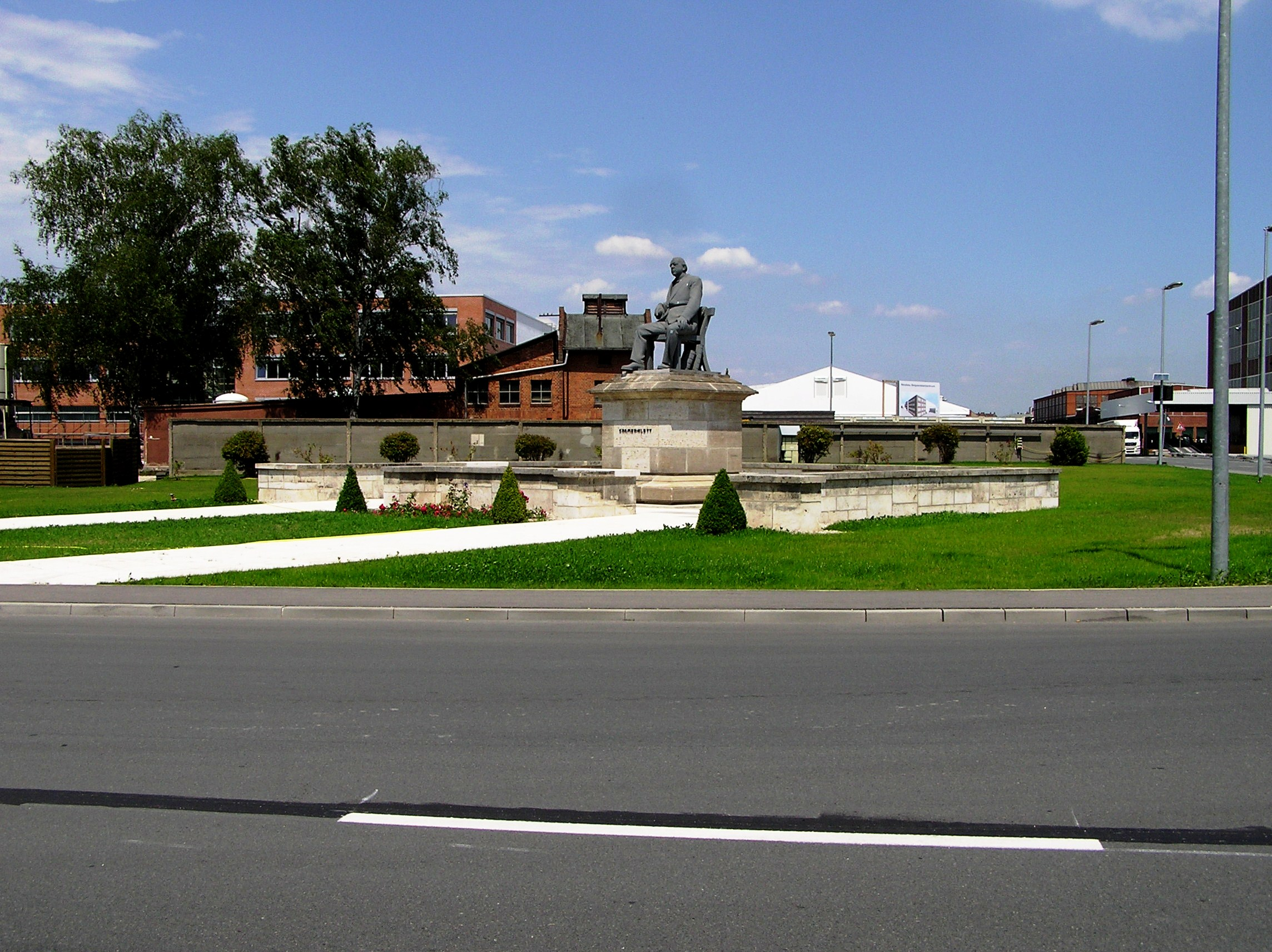 Das Theodor von Cramer-Klett-Denkmal, auf dem Werksgelände des MAN-Motorenwerks in Nürnberg.